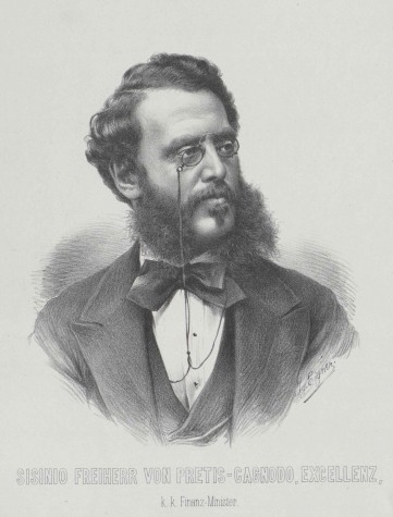 Sisinio svobodný pán von Pretis-Cagnodo (1828 - 1890), Rakousko-Uherský politik.